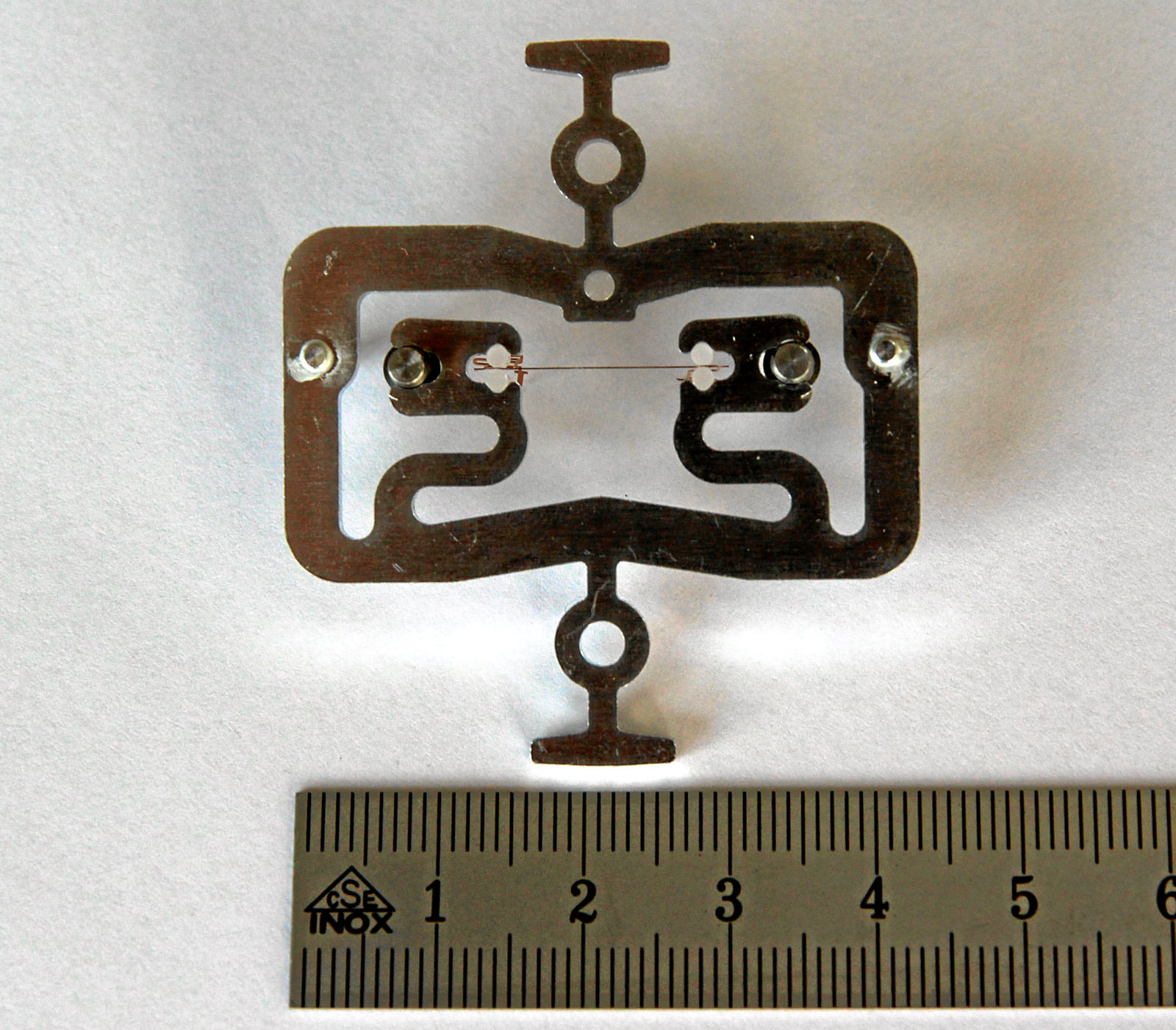 Schwinsaitenaufnehmer ohne Elektronik und Magnet